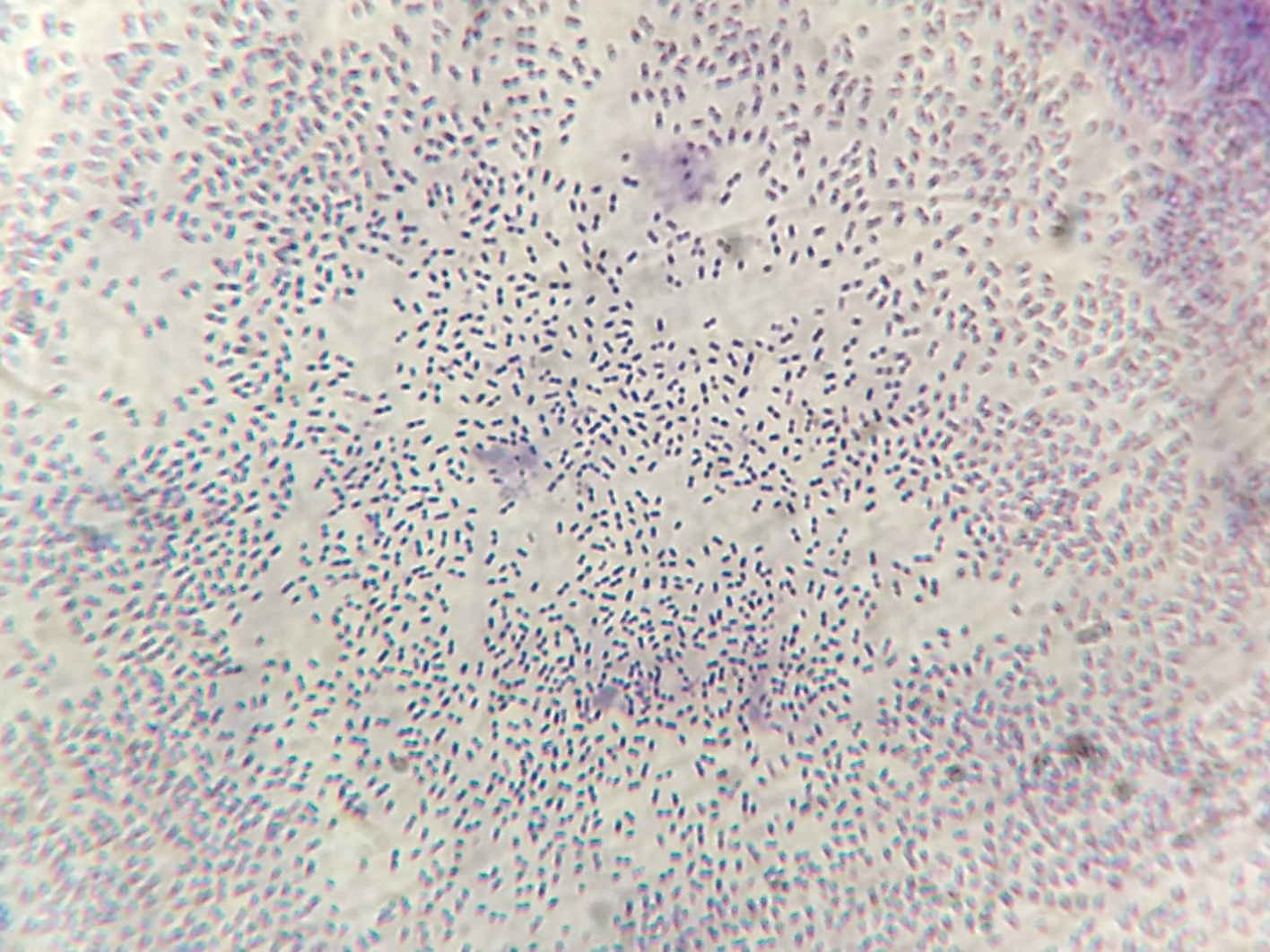 Sedimento de líquido cefalorraquídeo, fijado y teñido con May Grünwald Giemsa mostrando una asombrosa cantidad de diplococcus. Un cultivo posterior demostró que se trataban de Streptococcus pneumoniae